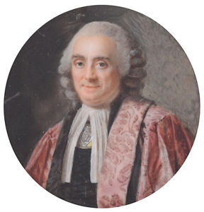 Étienne Benoist de La Grandière (1733-1805), maire de Tours